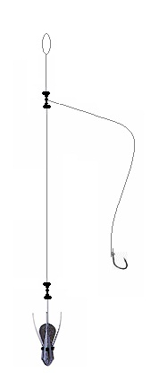 Montage trainard pour pêche en surfcasting